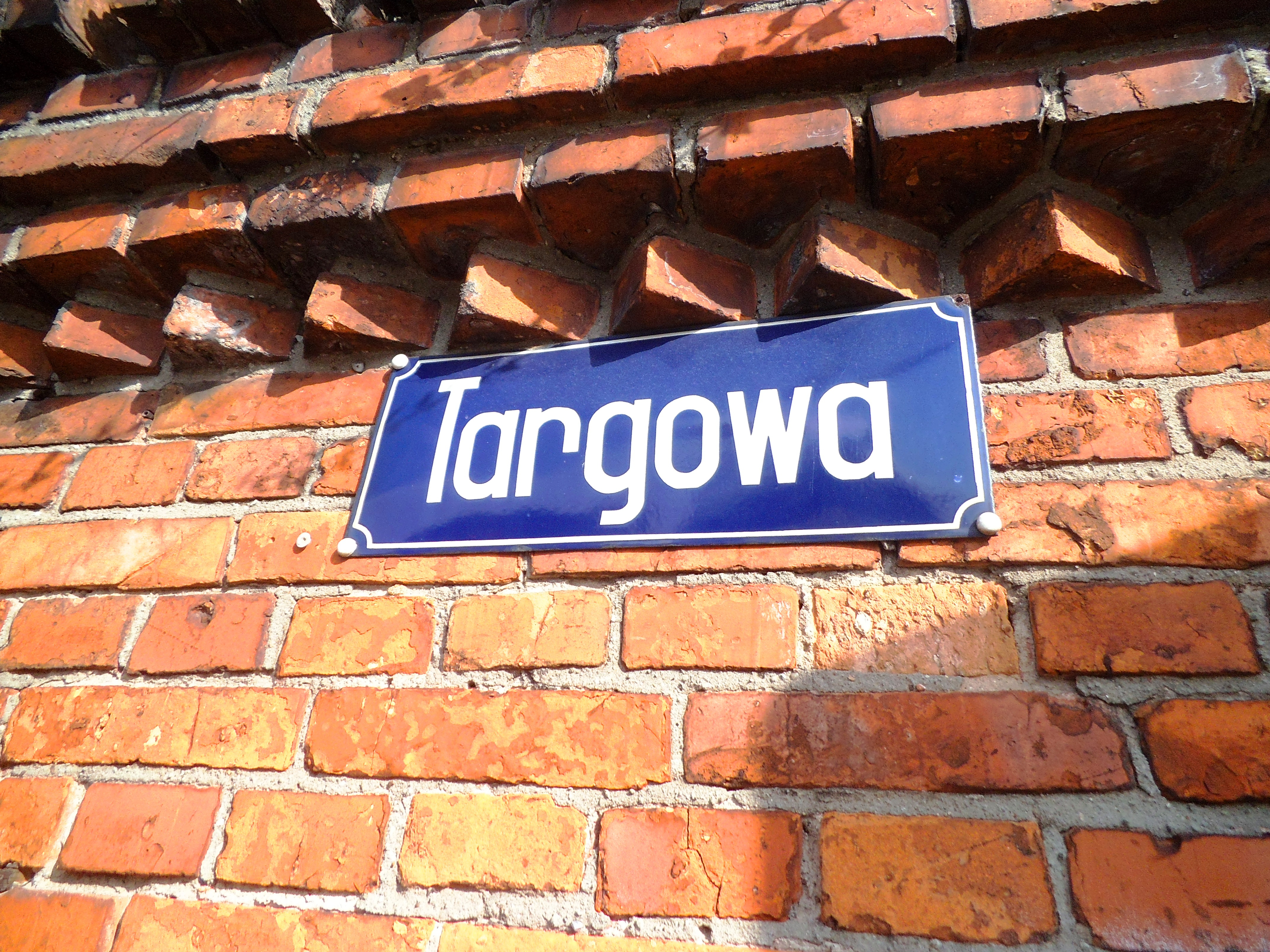 Tormięs w Toruniu1